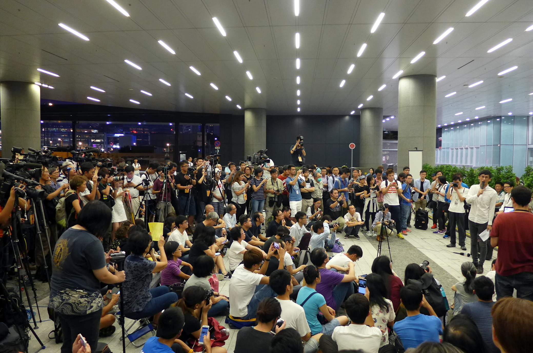 2016年10月26日，青年新政晚上6時在立法會大樓外舉行集會，主題為「捍衞三權分立，還我立法尊嚴」，約100人出席